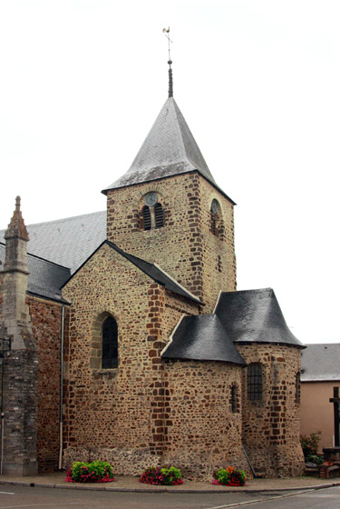 Nuillé-sur-Vicoin (Mayenne) - Eglise Ste Trinité